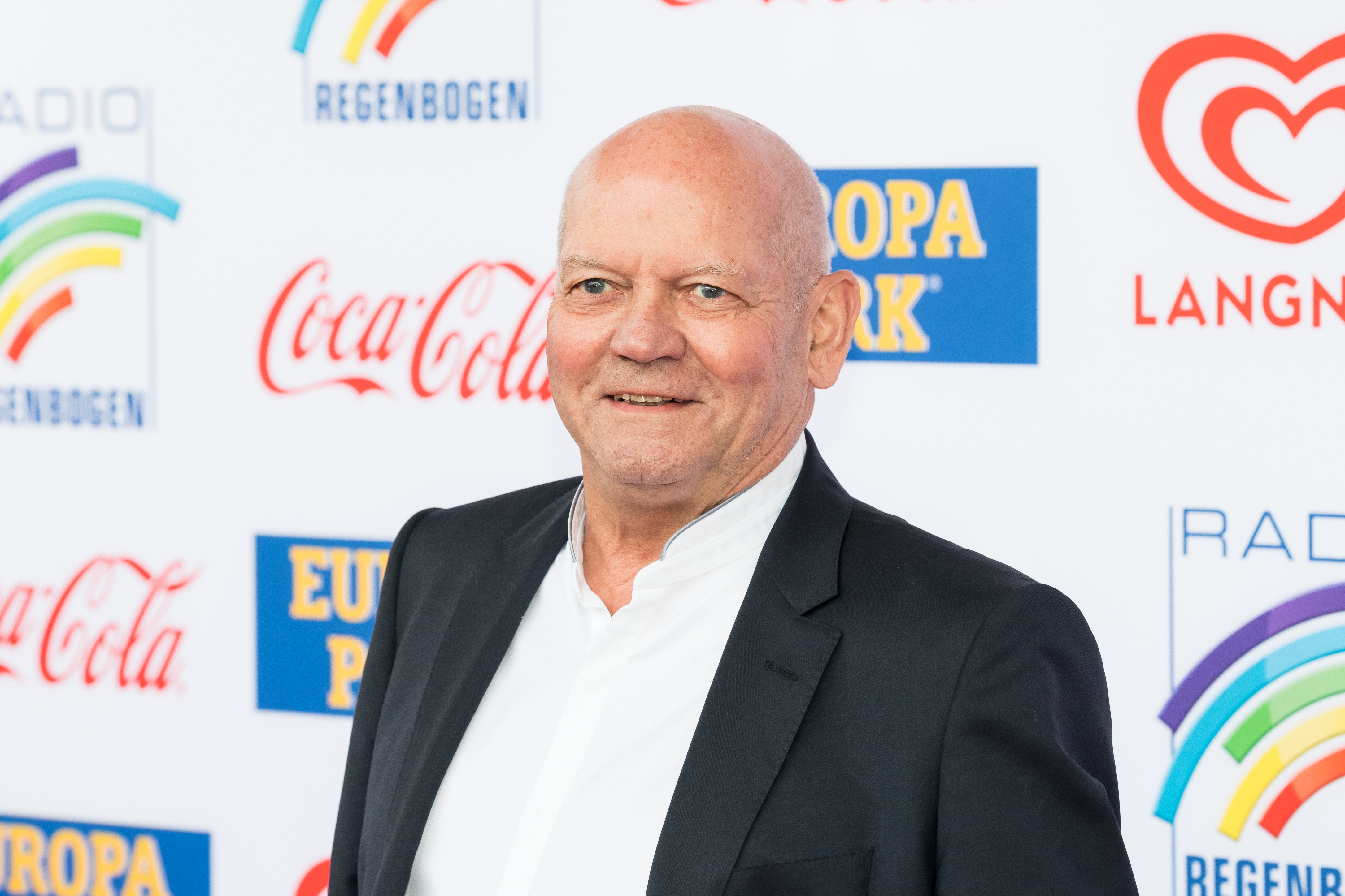 Joachim Hunold during Radio Regenbogen Award 2019 at Europapark, Rust, Baden-Württemberg, Germany on 2019-04-12, Photo: Sven Mandel